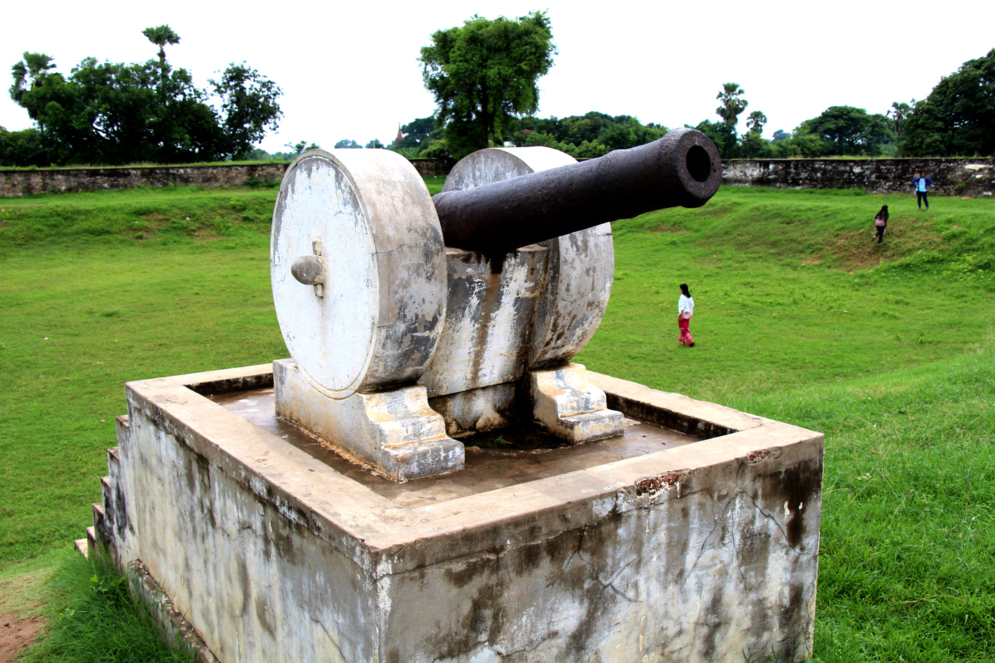 မြန်မာဘာသာ: အင်းဝ ဆင်ကျုံးခံတပ်အတွင်းရှိ အမြောက်